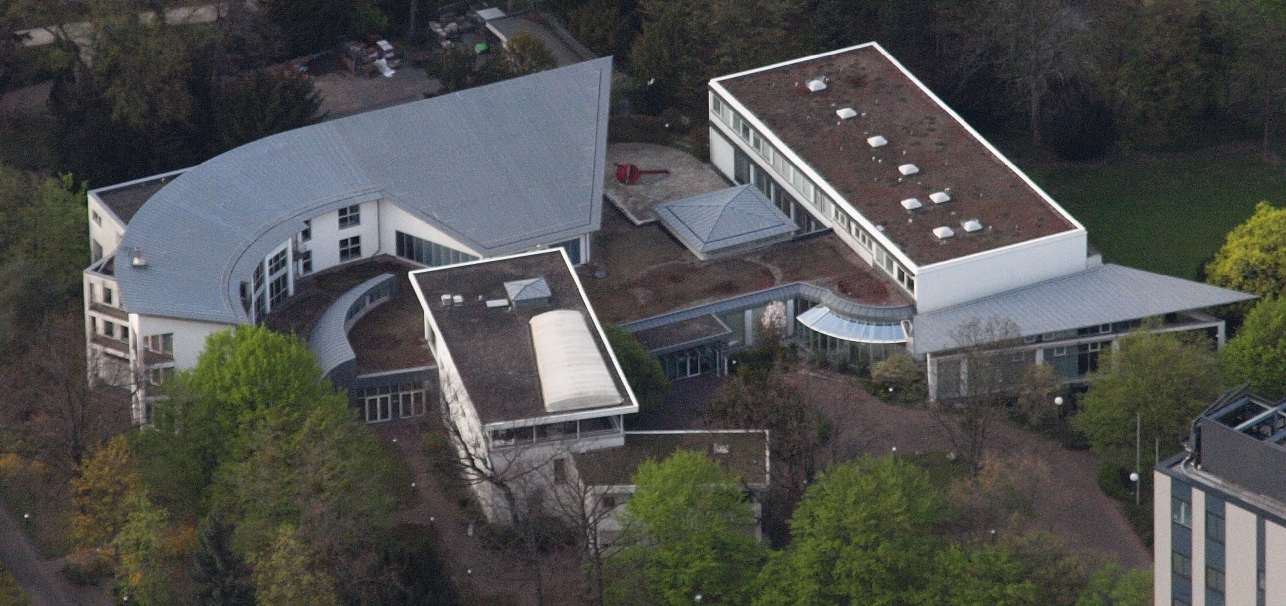 Ehemalige Landesvertretung Nordrhein-Westfalen, Dahlmannstraße 2, Bonn: Luftaufnahme